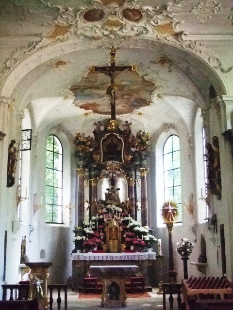 Wallfahrtskirche Zur Schmerzhaften Muttergottes, Matzenhofen, Gemeinde Unterroth, Landkreis Neu-Ulm Chor und Hochaltar